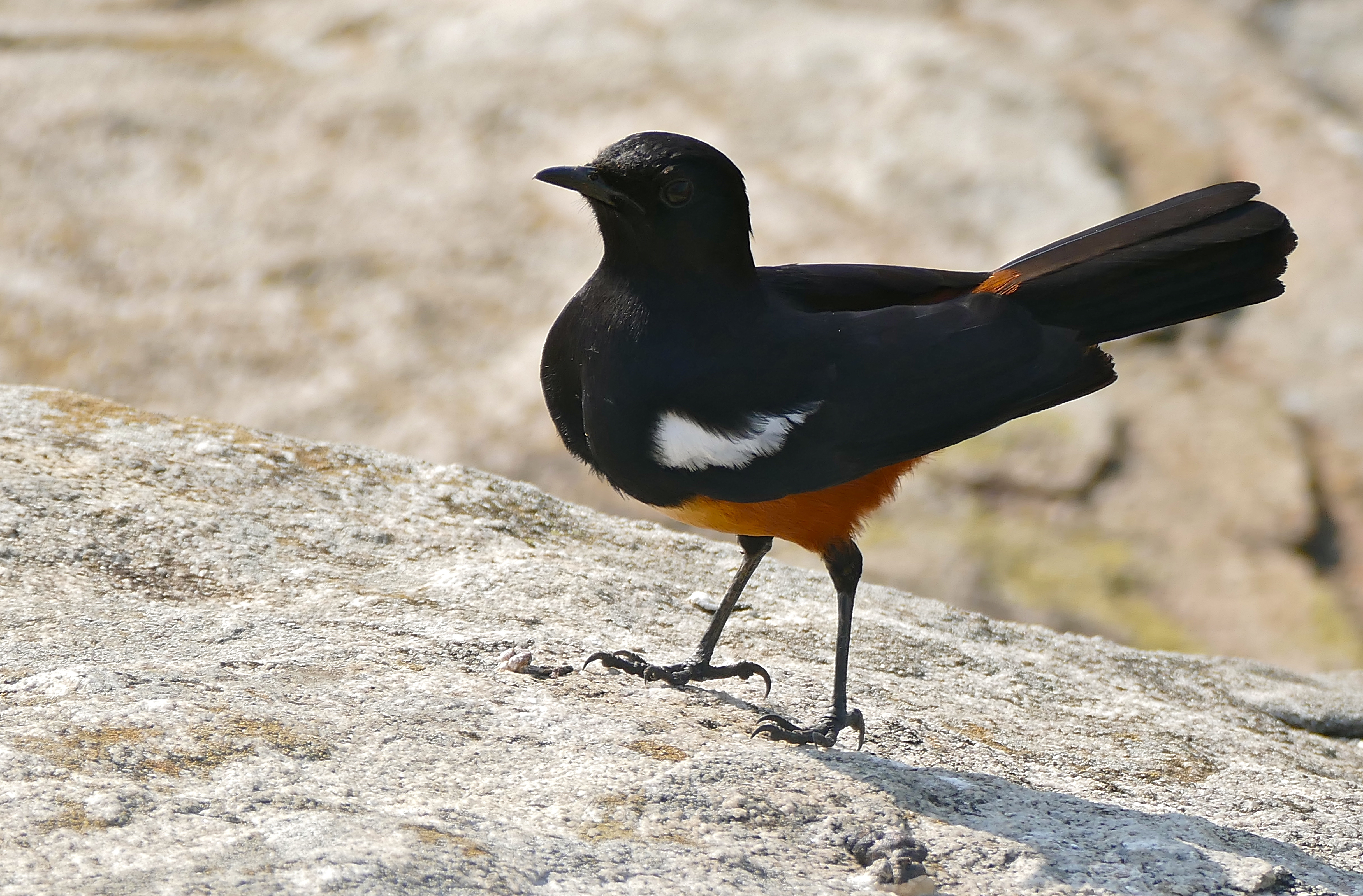 Mphafa Hide, iMfolozi Game Reserve, Hluhluwe-iMfolozi Park, Kwazulu-Natal, SOUTH AFRICA